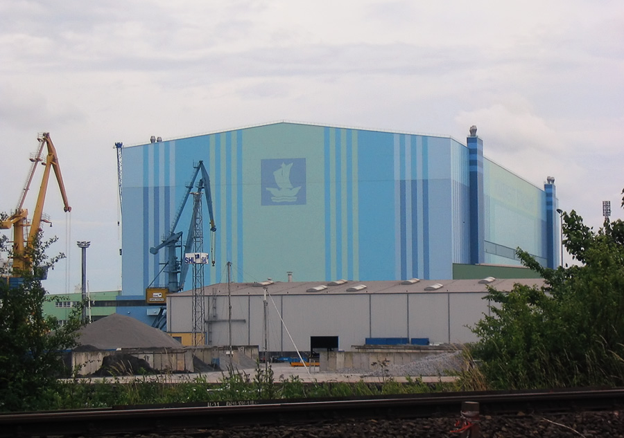 Beschreibung: Volkswerft Fotograf: Darkone, 1. Juli 2004